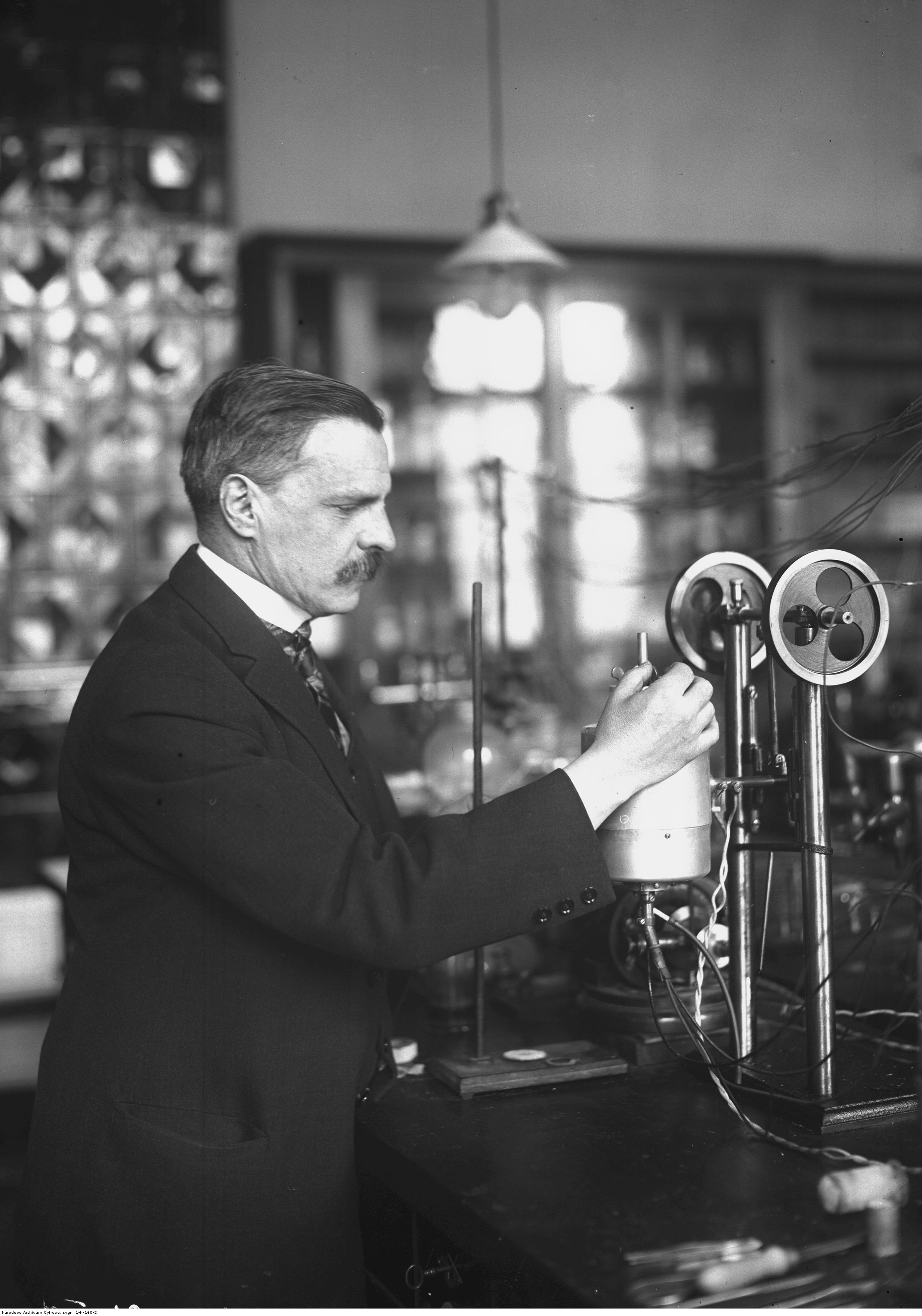 Tadeusz Kazimierz Estreicher - chemik, profesor Uniwersytetu Jagiellońskiego i Akademii Sztuk Pięknych w Krakowie podczas pracy w laboratorium.